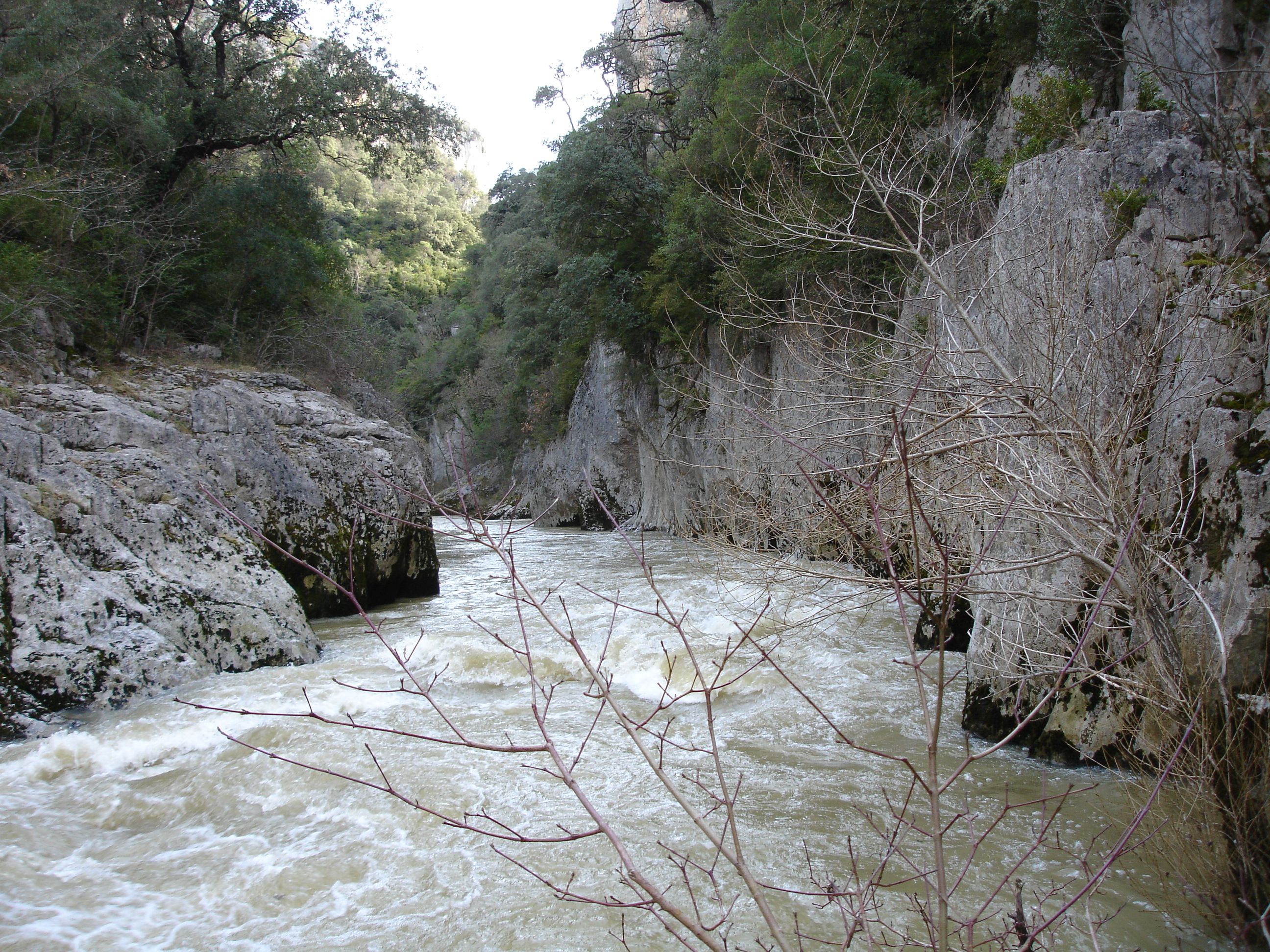 Foz de Arbayún (Navarra). Vista del río Salazar de cerca